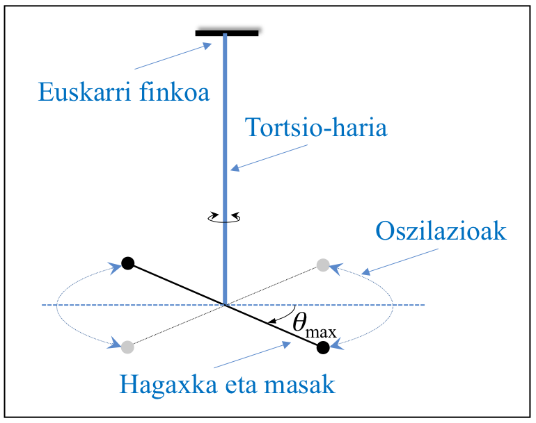 Tortsio-pendulu baten eskema grafikoa.